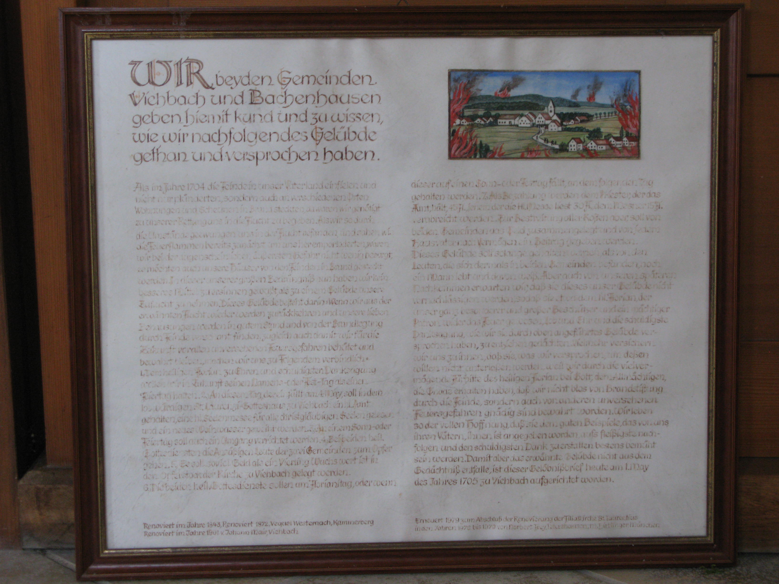 Nachbildung des Kirchengelübdes für Viehbach, während des Spanischen Erbfolgekrieges - Militärkampagne Herzog von Marlboroughs (Schellenberg / Blenheim) in Bayern im Juli 1704, von der Zerstörung verschont blieb.